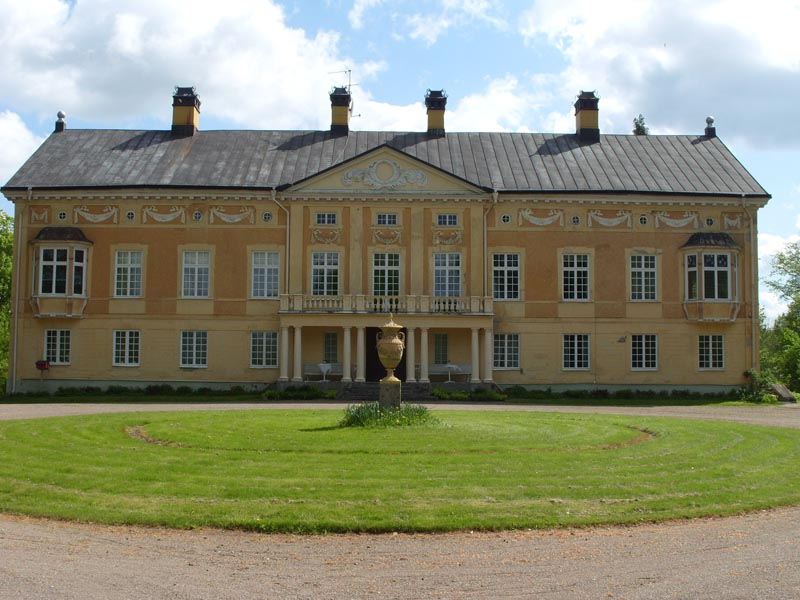 Trystorps Slott 20/5 2007 Martin Pålsson